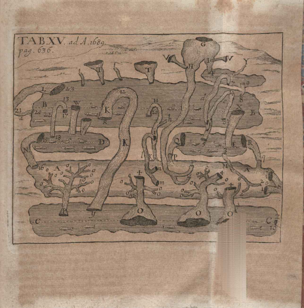 Illustration